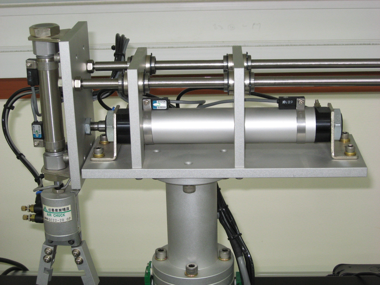 공압 PTP Robot과 이를 제어하기 위한 PLC 장치